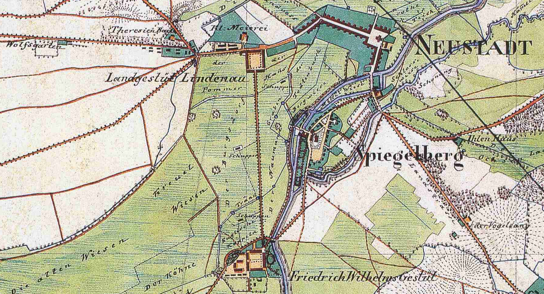 Neustadt (Dosse), Landkreis Ostprignitz-Ruppin, Brandenburg, Ausschnitt aus dem Urmesstischblatt 3140 Neustadt (Dosse) von 1841